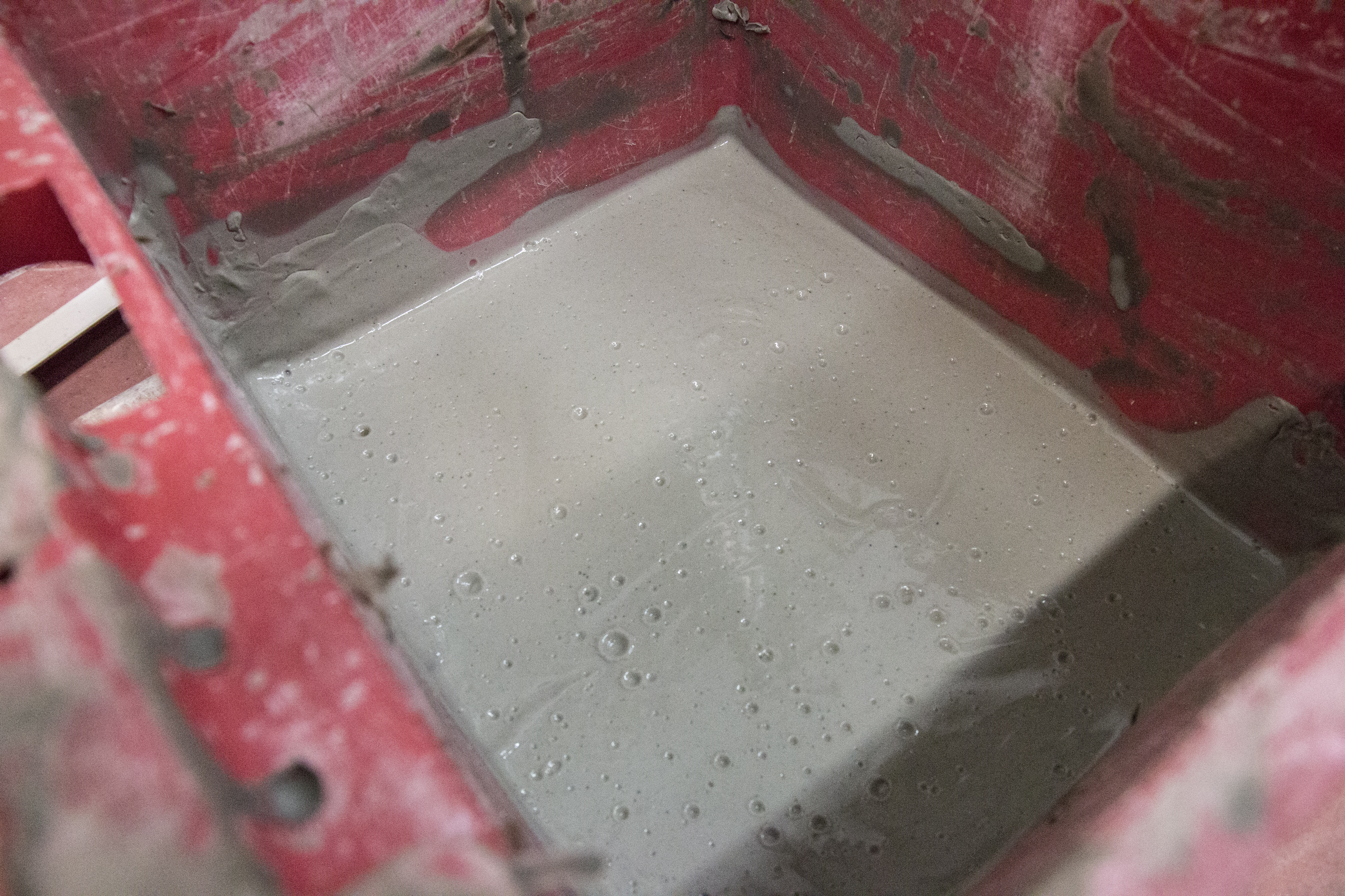 Bentonite